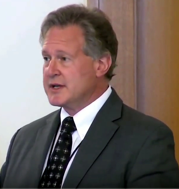 Robert H. Lustig, American epidemiologist